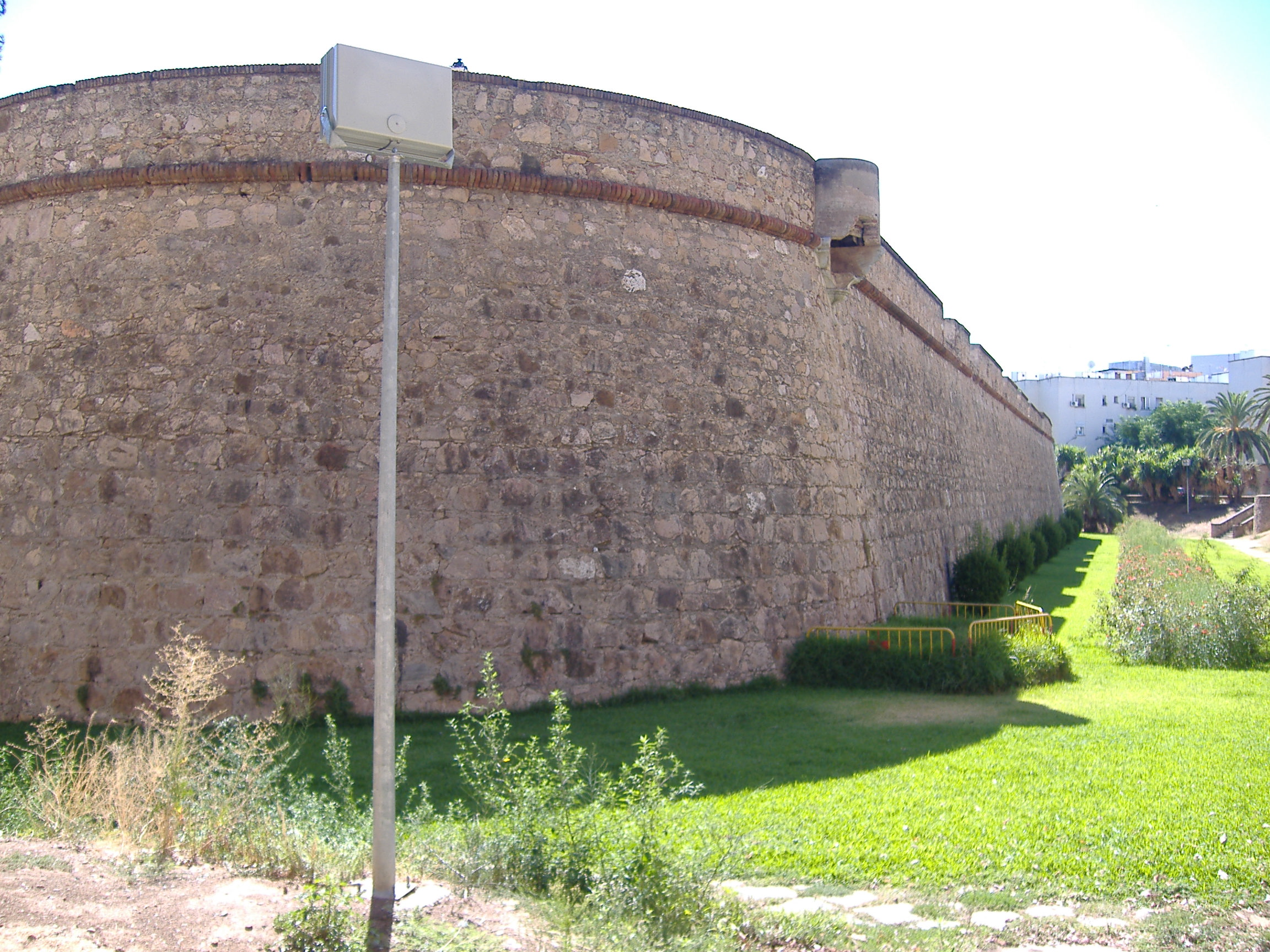 Muralla Vauván de Badajoz.